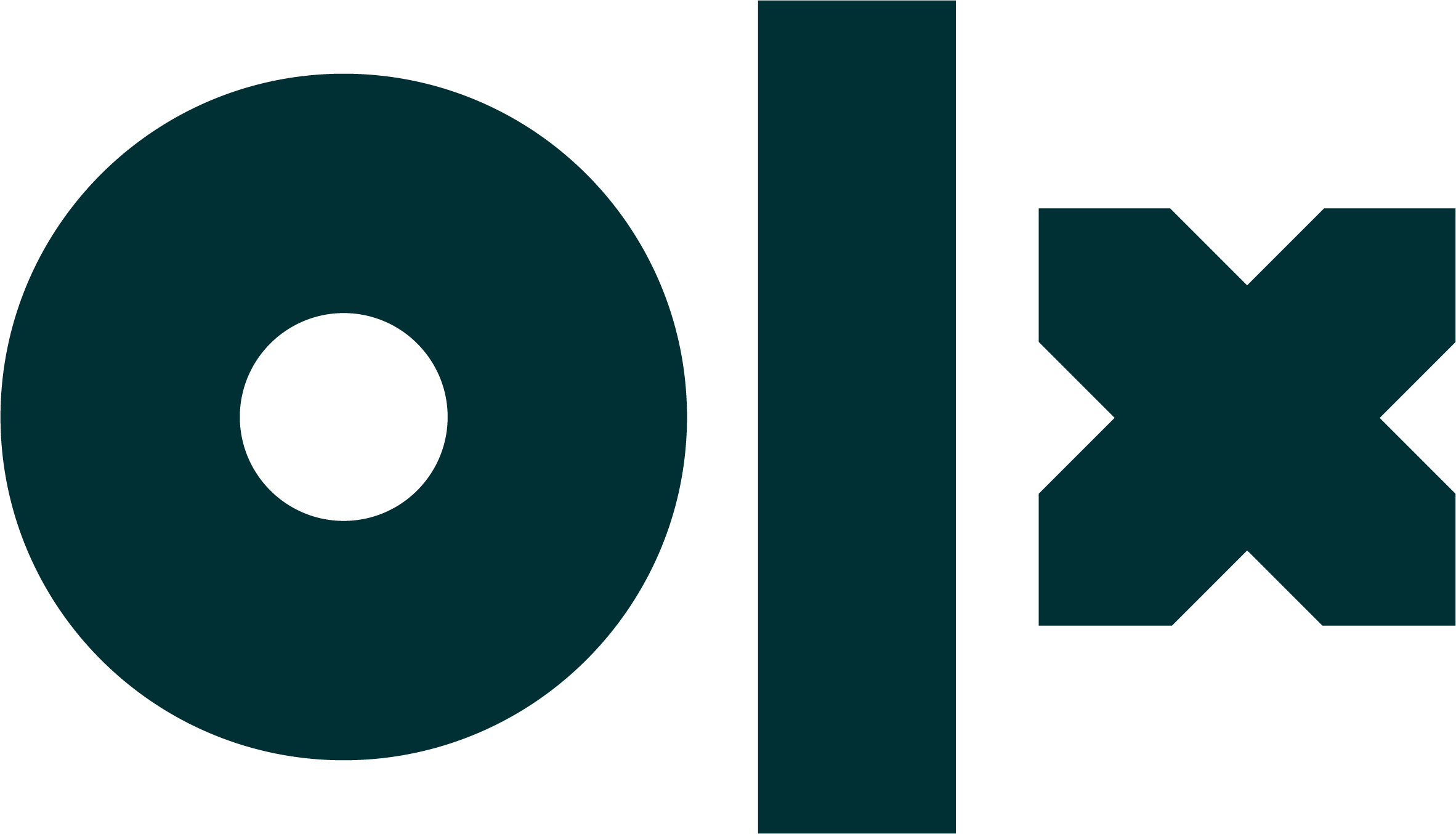 Logotyp OLX